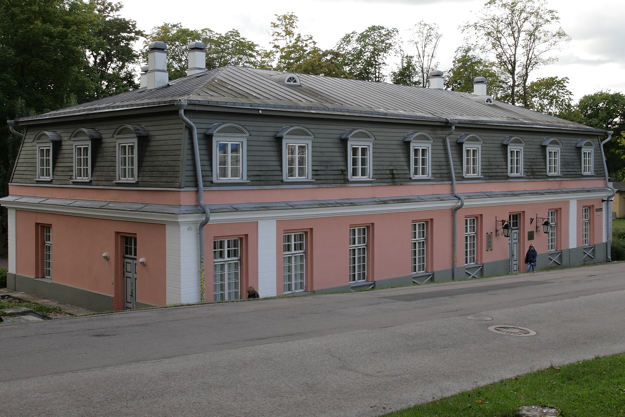 Kadrioru lossikompleksi köögihoone, A.Weizenbergi 28